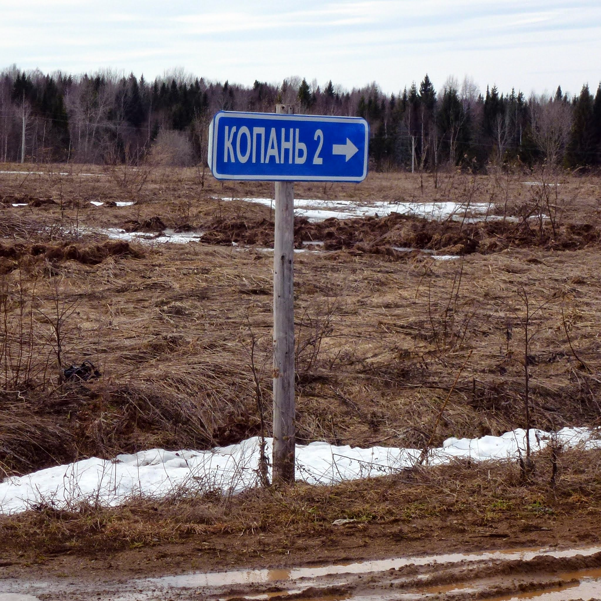 Поворот на Копань. Очёрский район. Пермский край